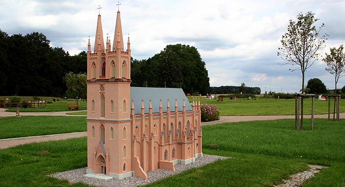 Klosterkirche Dobbertin, Detailgetreue Nachbildung im Landschaftspark SehLand - Göldenitz - Mecklenburg-Vorpommern.